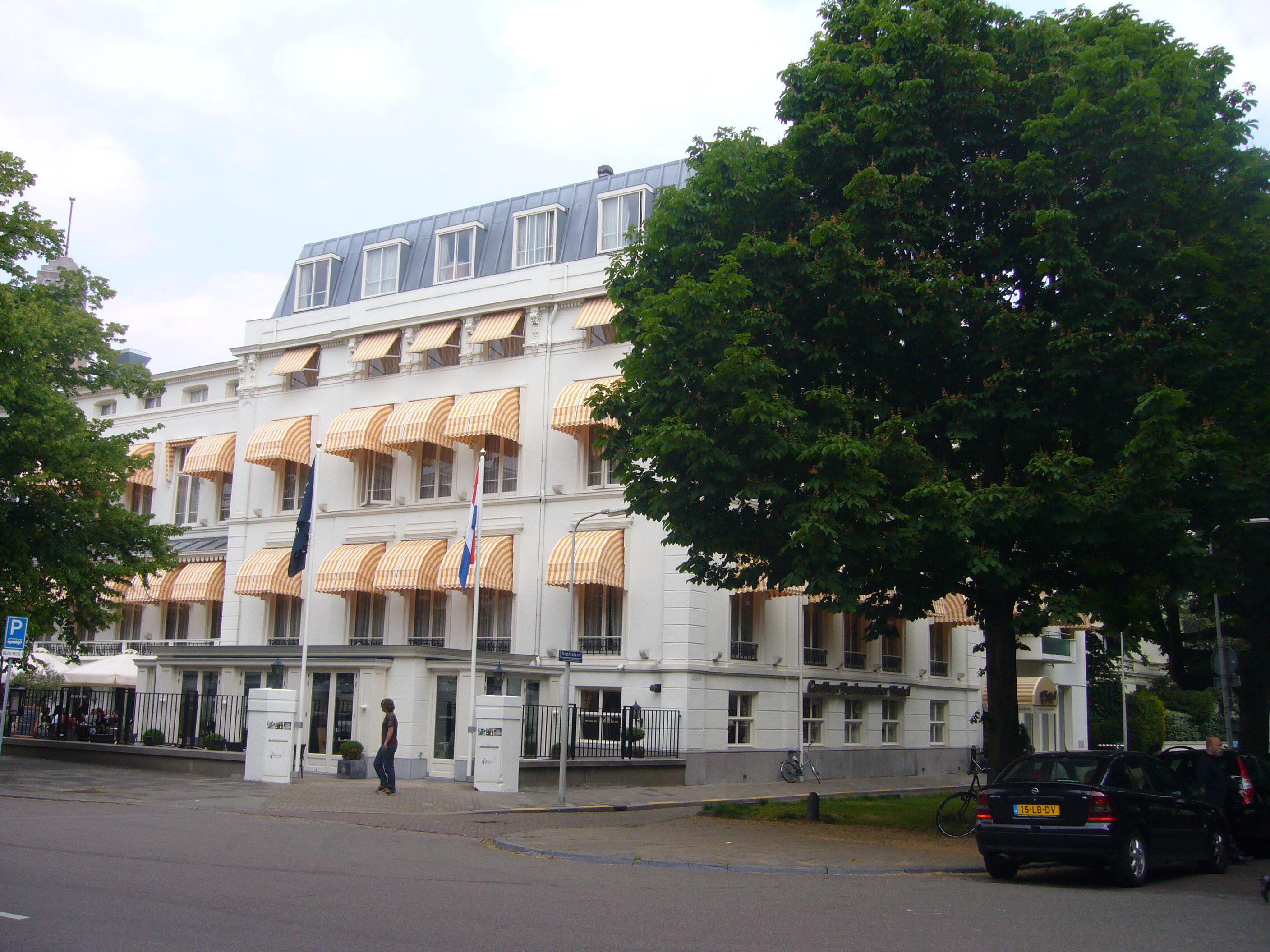 Carlton Ambassador Hotel Den Haag